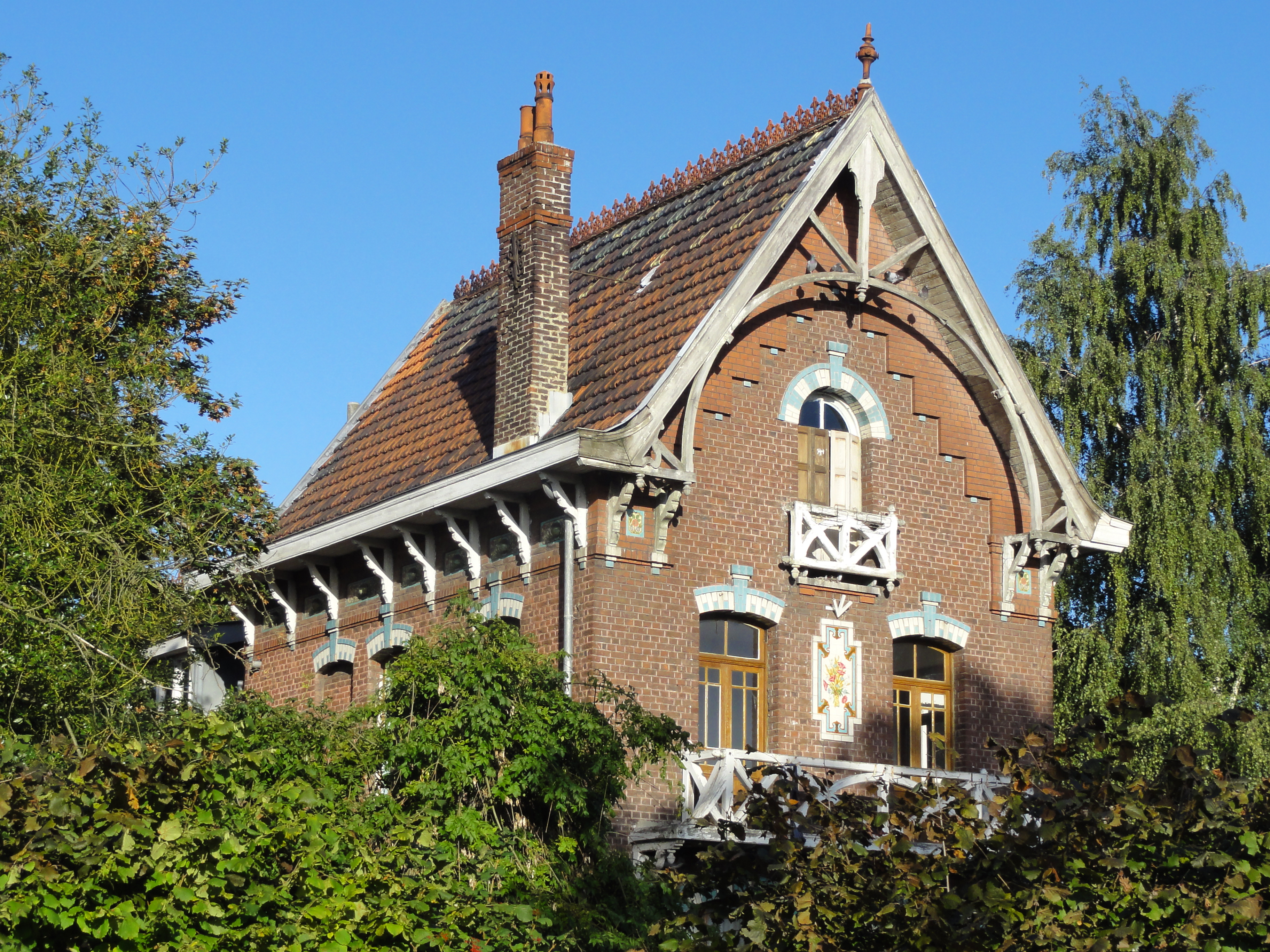 École ménagère des cités de la fosse Arenberg de la Compagnie des mines d'Anzin, Wallers, Nord, Nord-Pas-de-Calais, France. L'école ménagère est inscrite sur la liste du patrimoine mondial par l'Unesco le 30 juin 2012 et y constitue en partie le site no 15. .